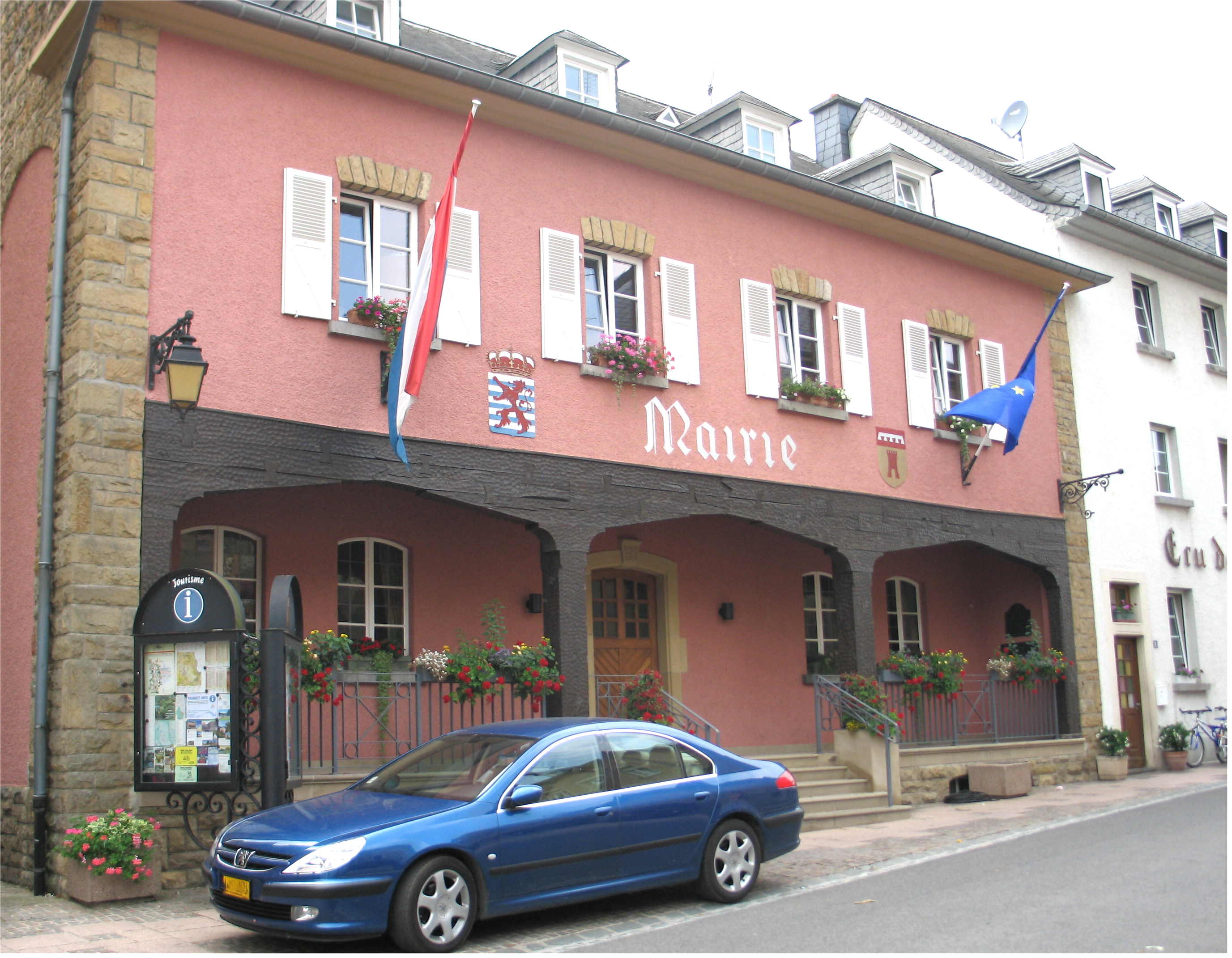 Sujet :Gemeng vu Beefort Source : Eege Foto vum Johnny Chicago Lizenz